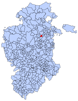 Quintanabureba en Burgos